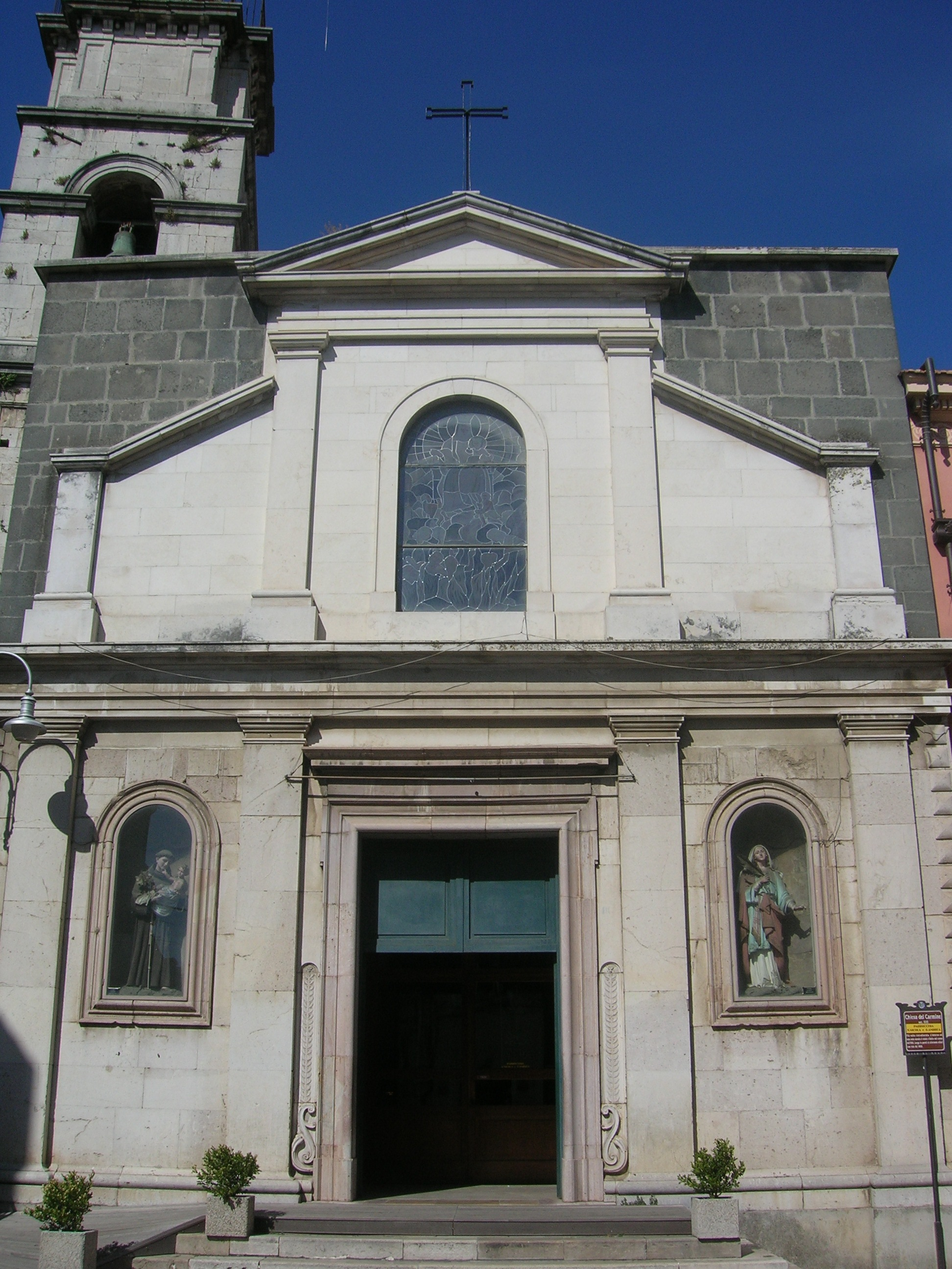 Chiesa del Carmine, Melfi (Basilicata)